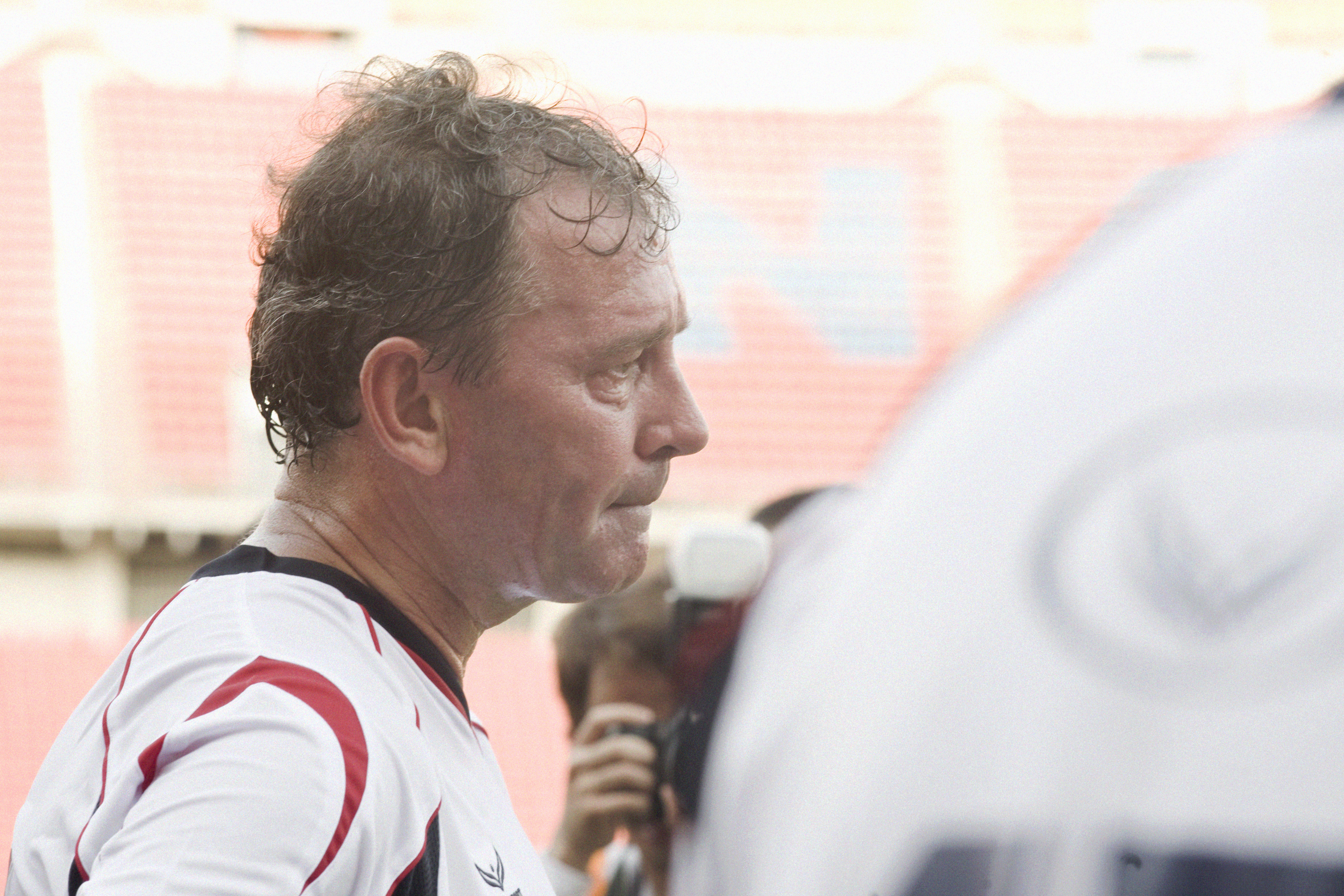 ไบรอัน ร็อบสัน / นายกรัฐมนตรี นำทีมนักกีฬาฟุตบอลชายกิตติมศักดิ์เข้าร่วมการแข่งขันฟุตบอลนัดพิเศษกับทีม ฟุตบอลหญิงทีมชาติไทยชุดใหญ่ ณ สนามราชมังคลากีฬาสถาน กรุงเทพฯ 21 กุมภาพันธ์ 2553 (The Official Site of The Prime Minister of Thailand Photo by พีรพัฒน์ วิมลรังครัตน์)